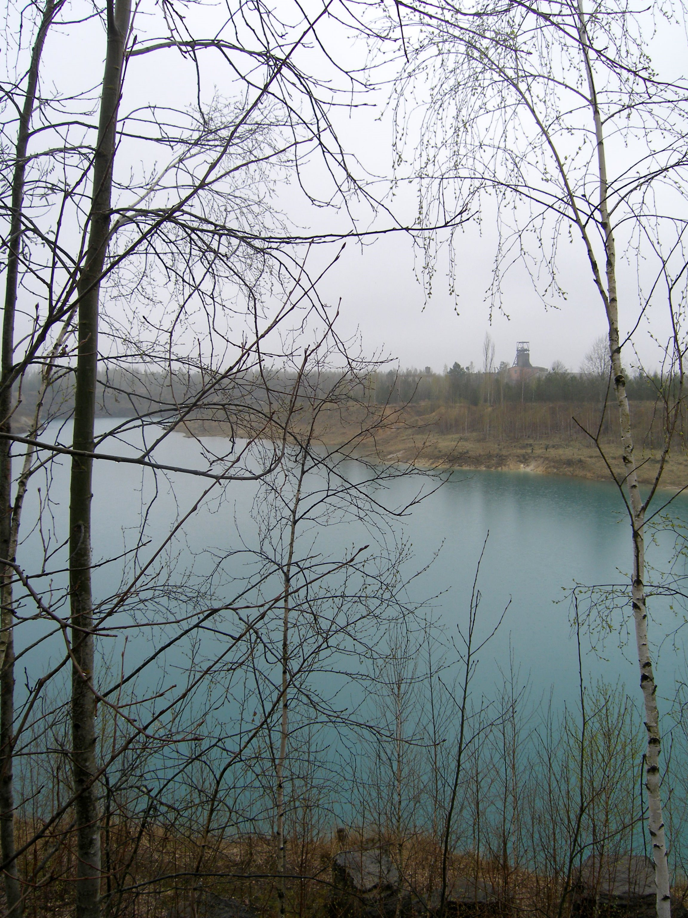 Abandoned quarry near Volodarsk-Volynsky, Zhytomyr region, Ukraine